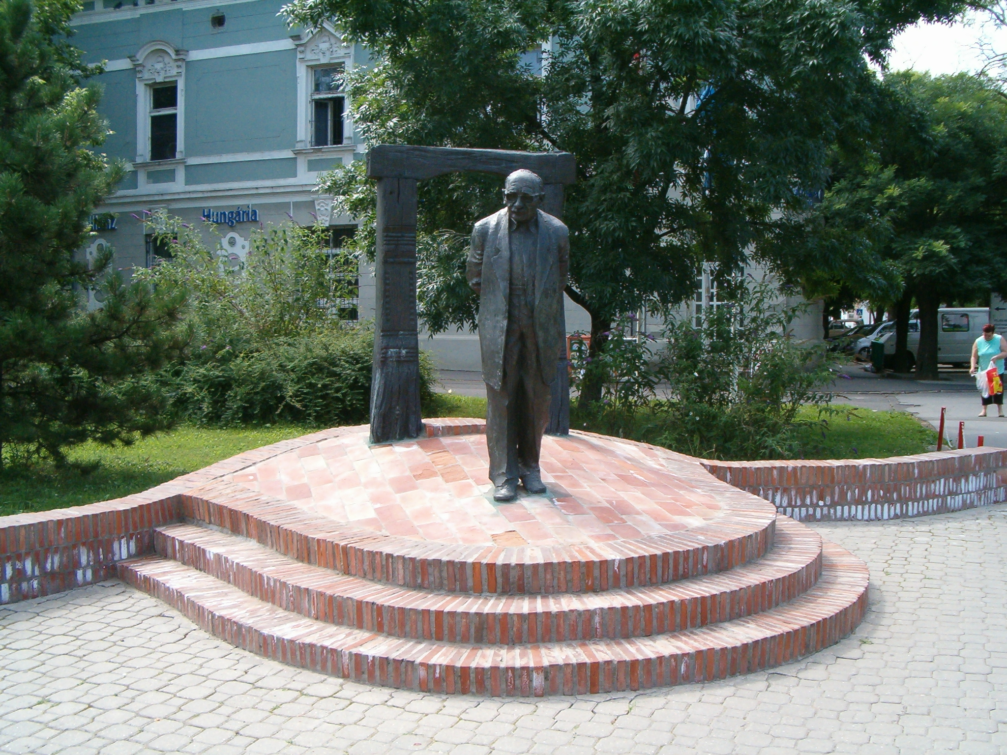 Németh Gyula (1890–1976) nyelvész, turkológus, az MTA tagja szobra Karcagon. Györfi Sándor alkotása (1990)